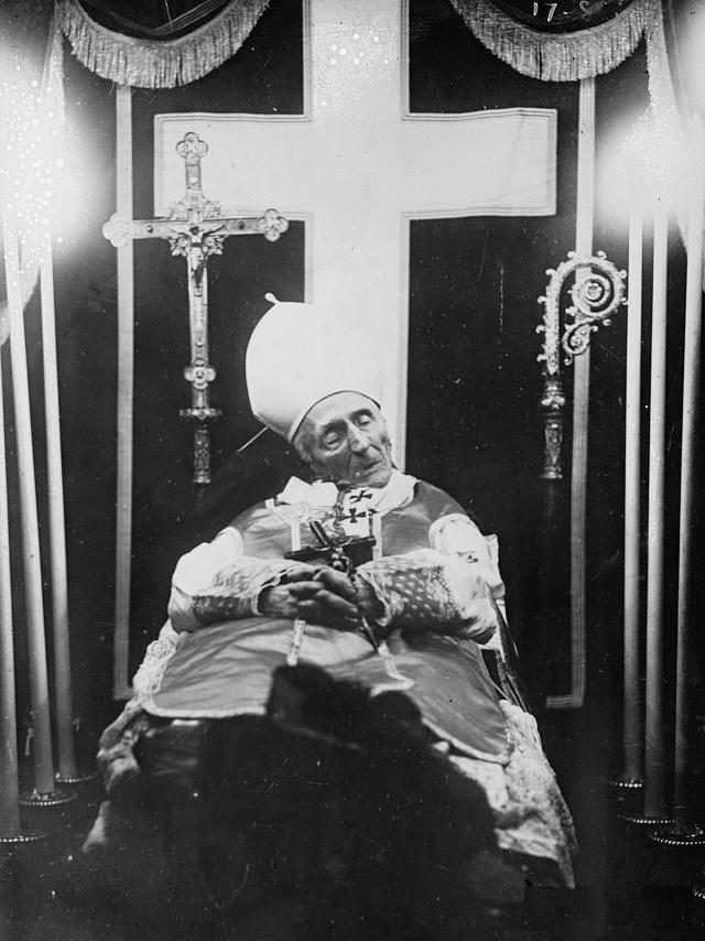 Le Cardinal-Archevêque Richard de la Vergne mis en bière à Notre-Dame de Paris